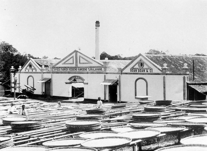 Repronegatief. In Tapioca Fabriek Kedoeng Kawoeng Tjikalahang van de firma Goan Goan & Co wordt cassave gedroogd, Java